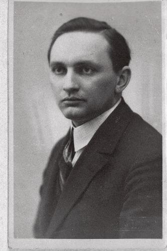 Verner Nerep